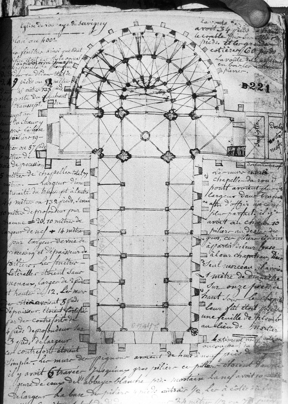 Savigny le Vieux, abbaye, plan de l'église abbatiale dessiné dans un cahier de l'abbé Lemesle